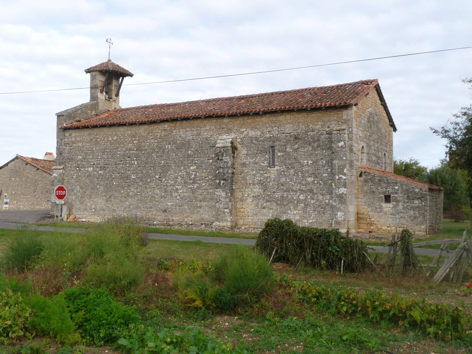 église de Turgon, Charente, France